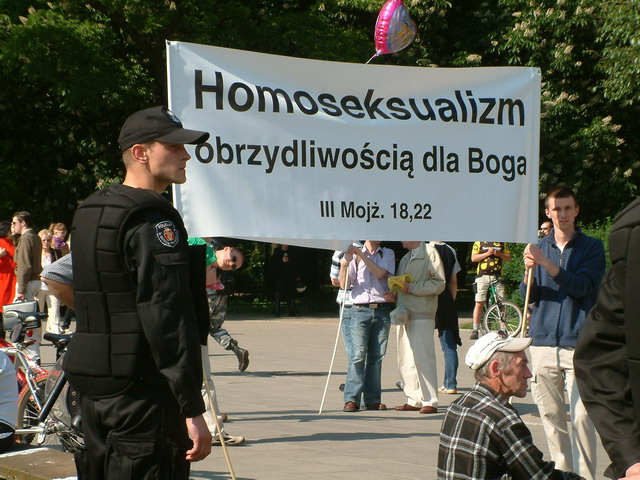 „Homoseksualizm obrzydliwością dla Boga. III. Mojż. 18.22“, Poland, Warsaw, Parada Równości